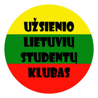 Užsienio lietuvių studentų klubo logotipas (2006-2016 m.)